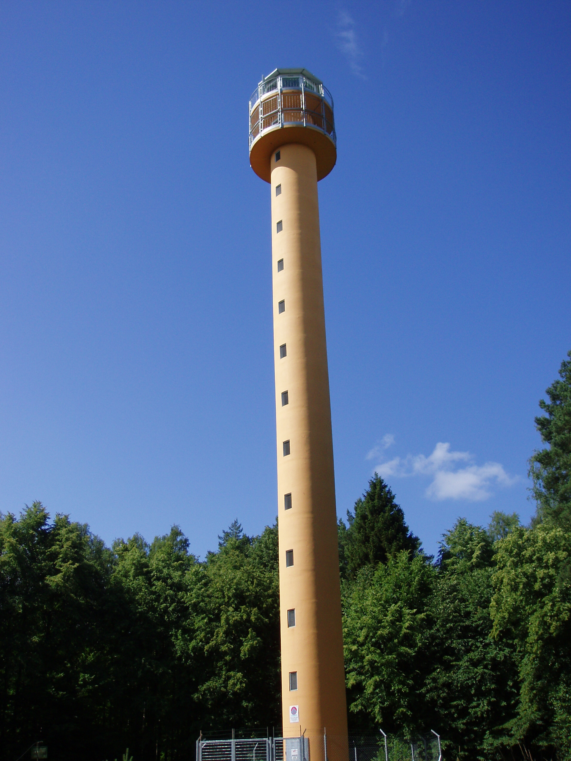 Leśna wieża obserwacyjna przeciwpożarowa, w pobliżu zabudowań nadleśnictwa Wichrowo